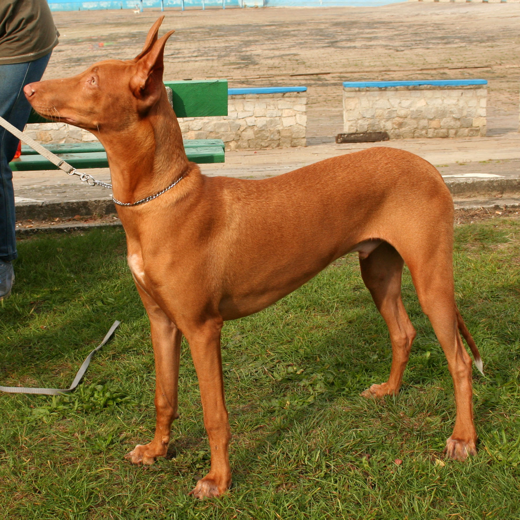 Pies faraona